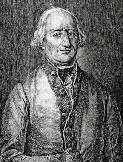 Karl Freiherr von Enzenberg (1725, Padova -1810, Sibiu) vor 1800